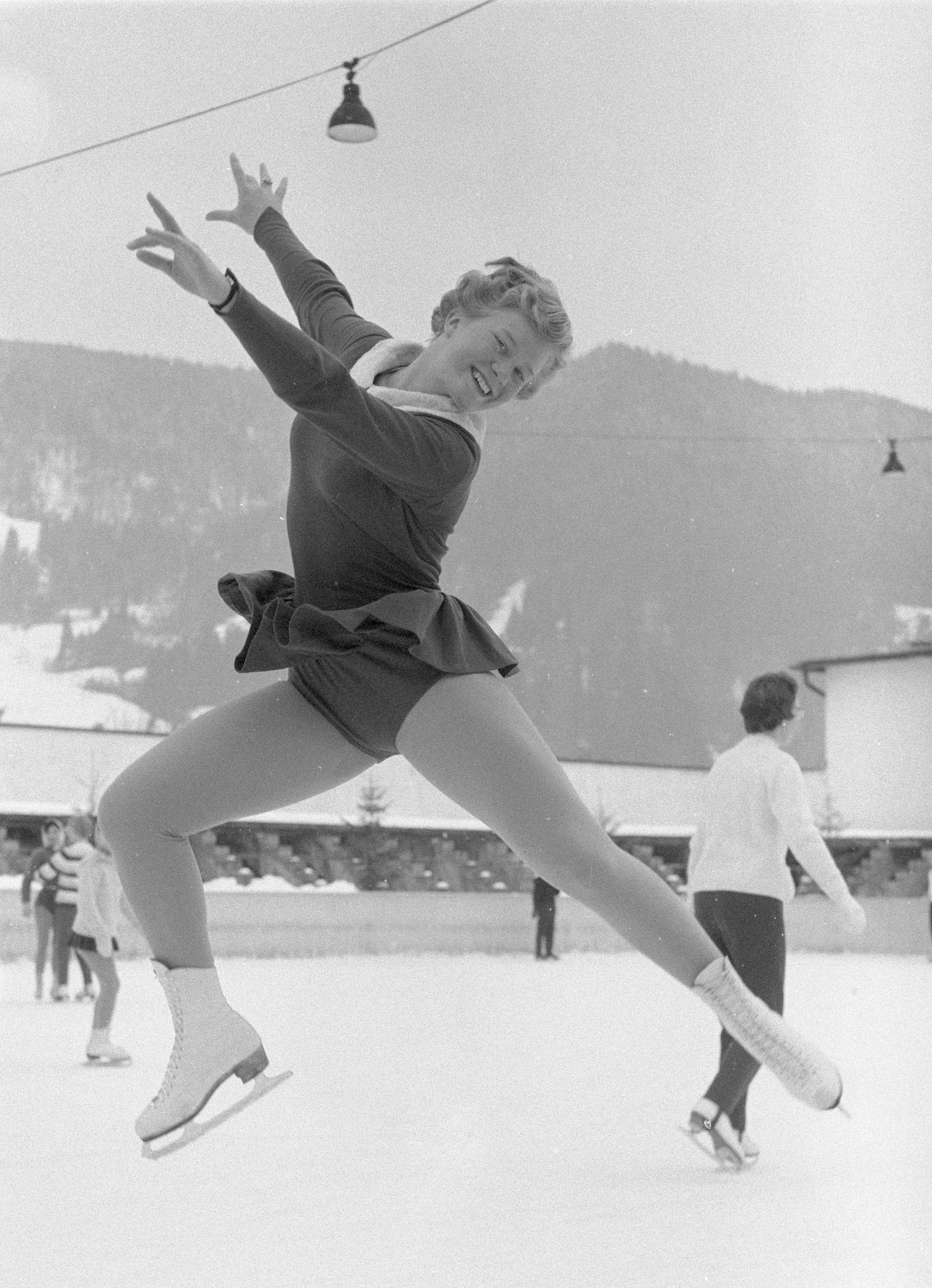 Sjoukje Dijkstra in Garmisch. Location: Garmisch